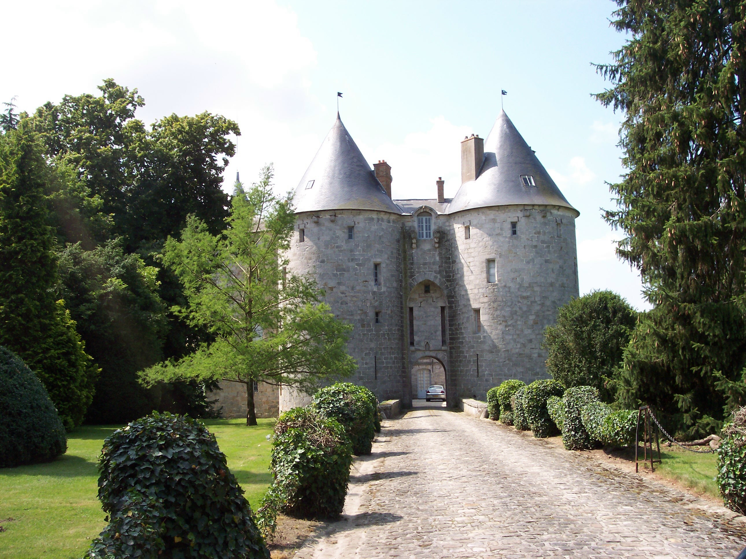 le Château de la Grange Blesneau où vécut le Marquis Gilbert du Motier de La Fayette